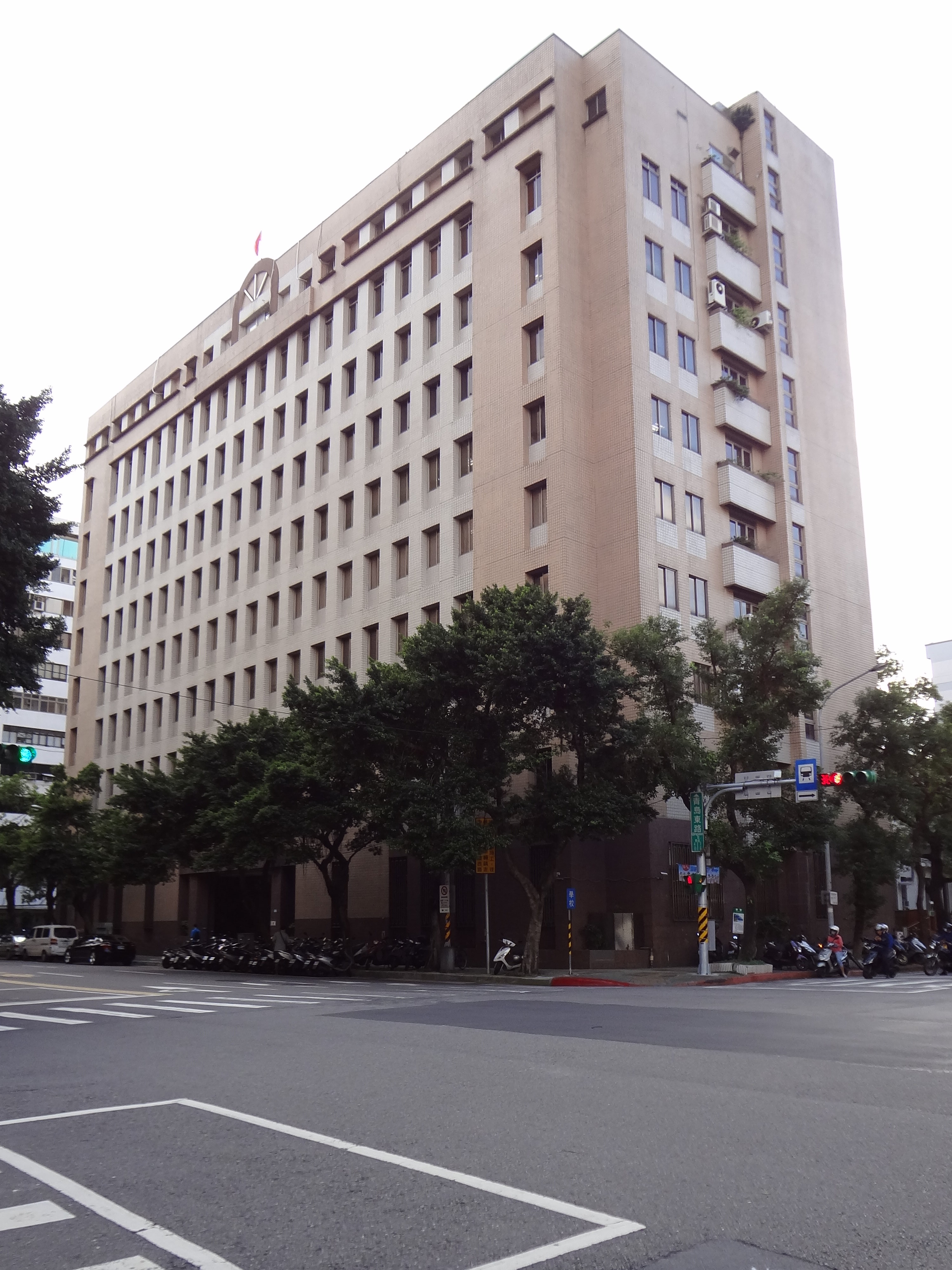 衛生福利部疾病管制署，位於臺北市中正區林森南路6號。